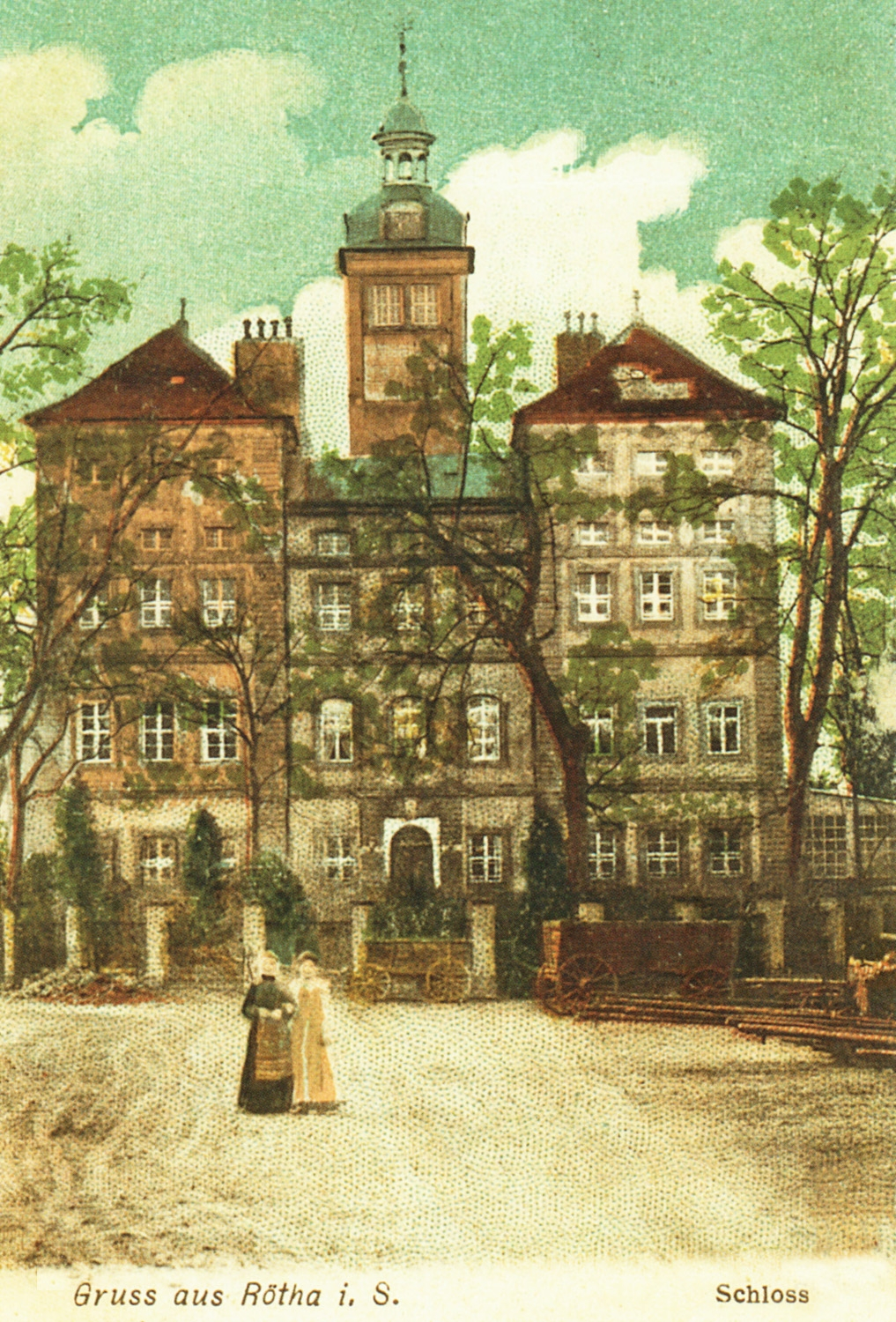 Schloss Rötha, Postkarte von 1910